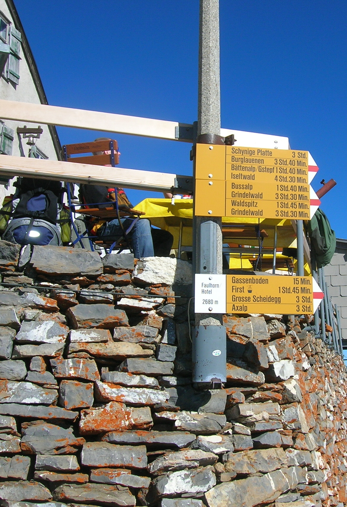 Wegweiser auf dem Faulhorn